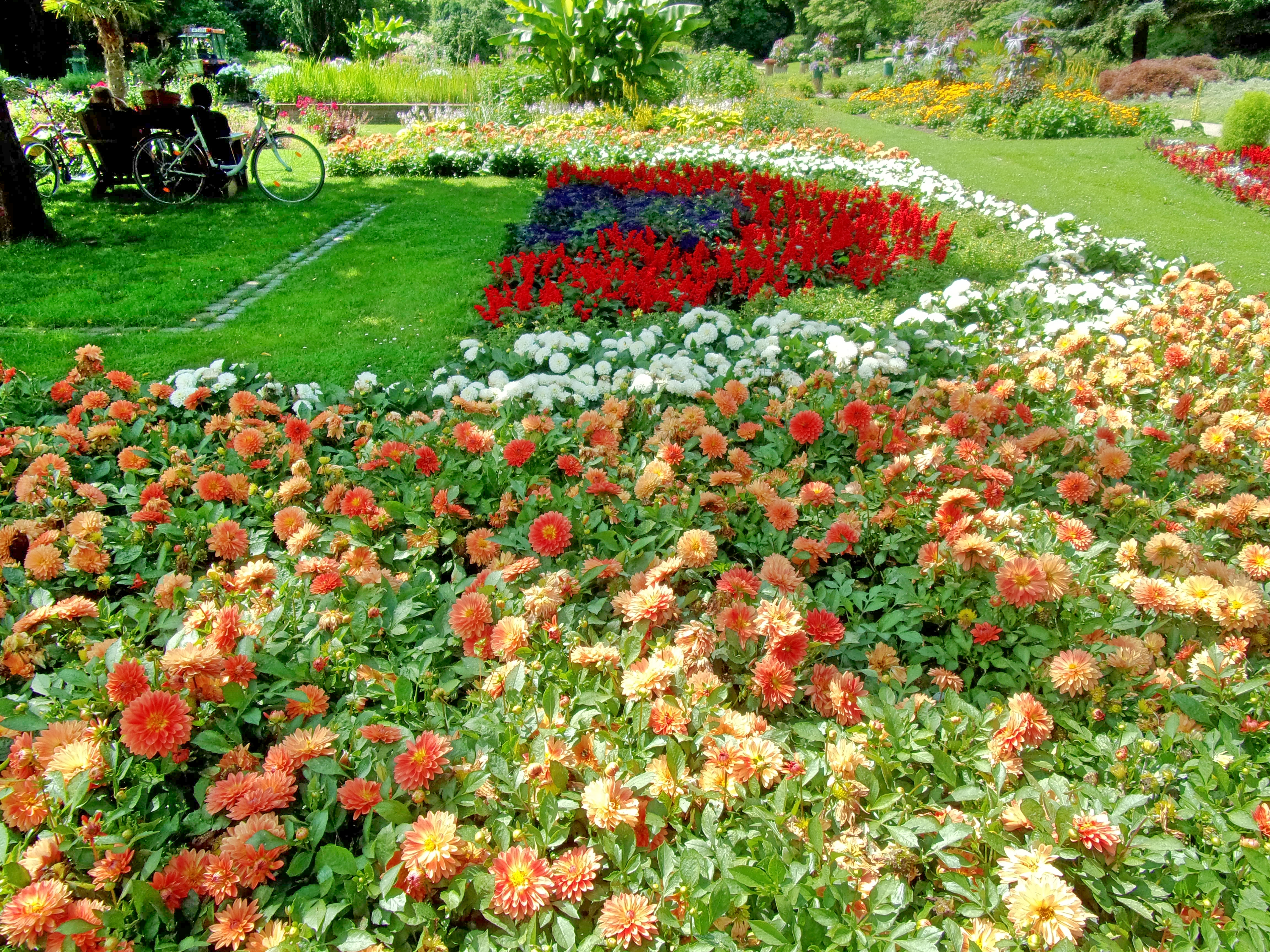 Blumenbeet im Botanischen Sondergarten in Wandsbek.